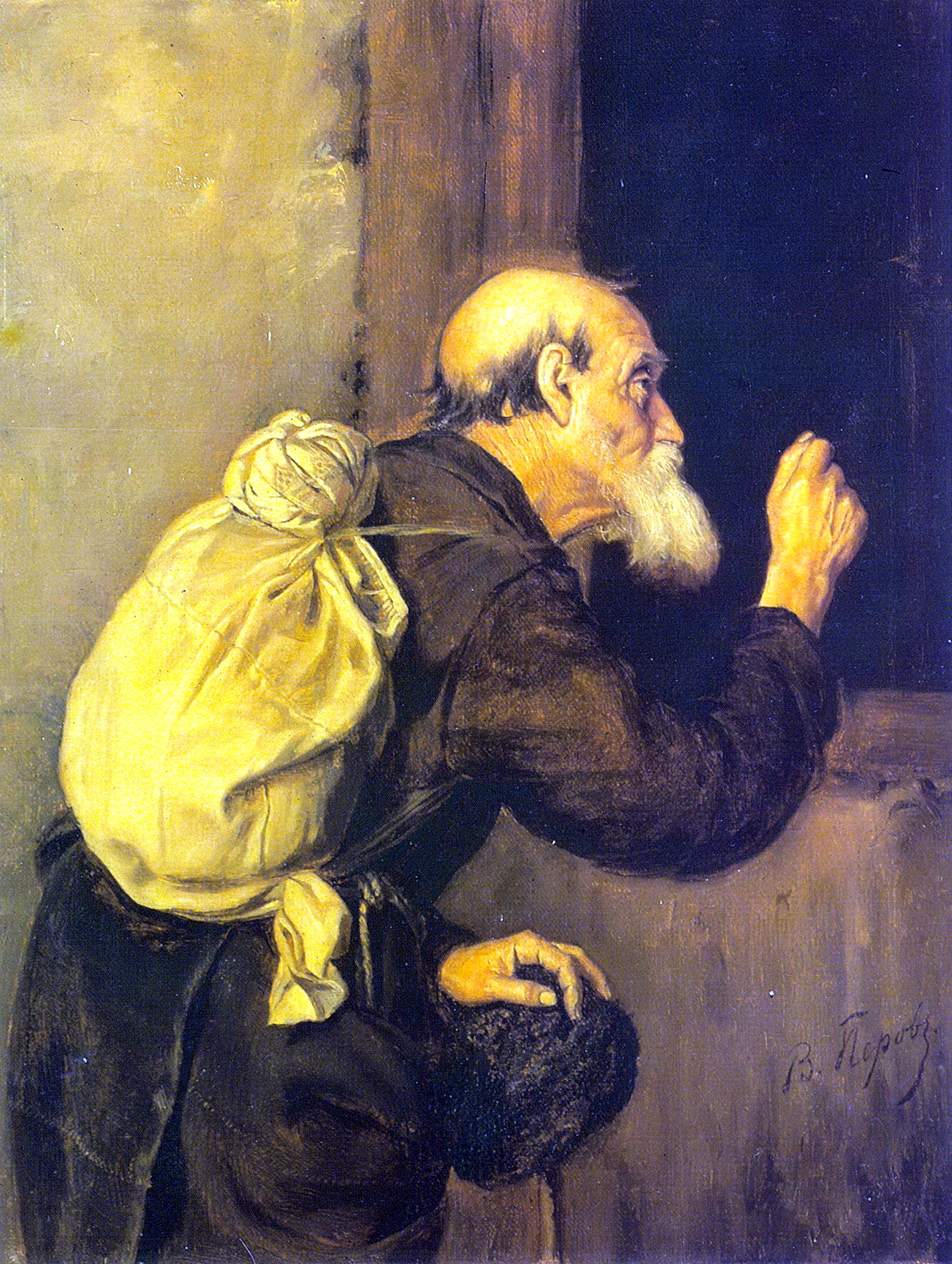 Странник